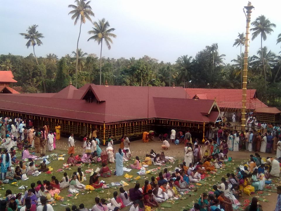 THRIKKADAVOOR KSHETHAM